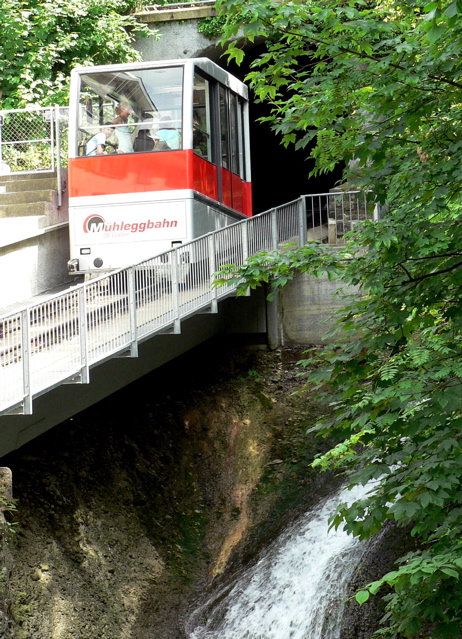 Describtion: Mühleggbahn, St Gallen, Switzerland Source: Own Work Date: 16.6.2006 Author: Michael Meding, Factory X 18:09, 16 June 2006 (UTC)